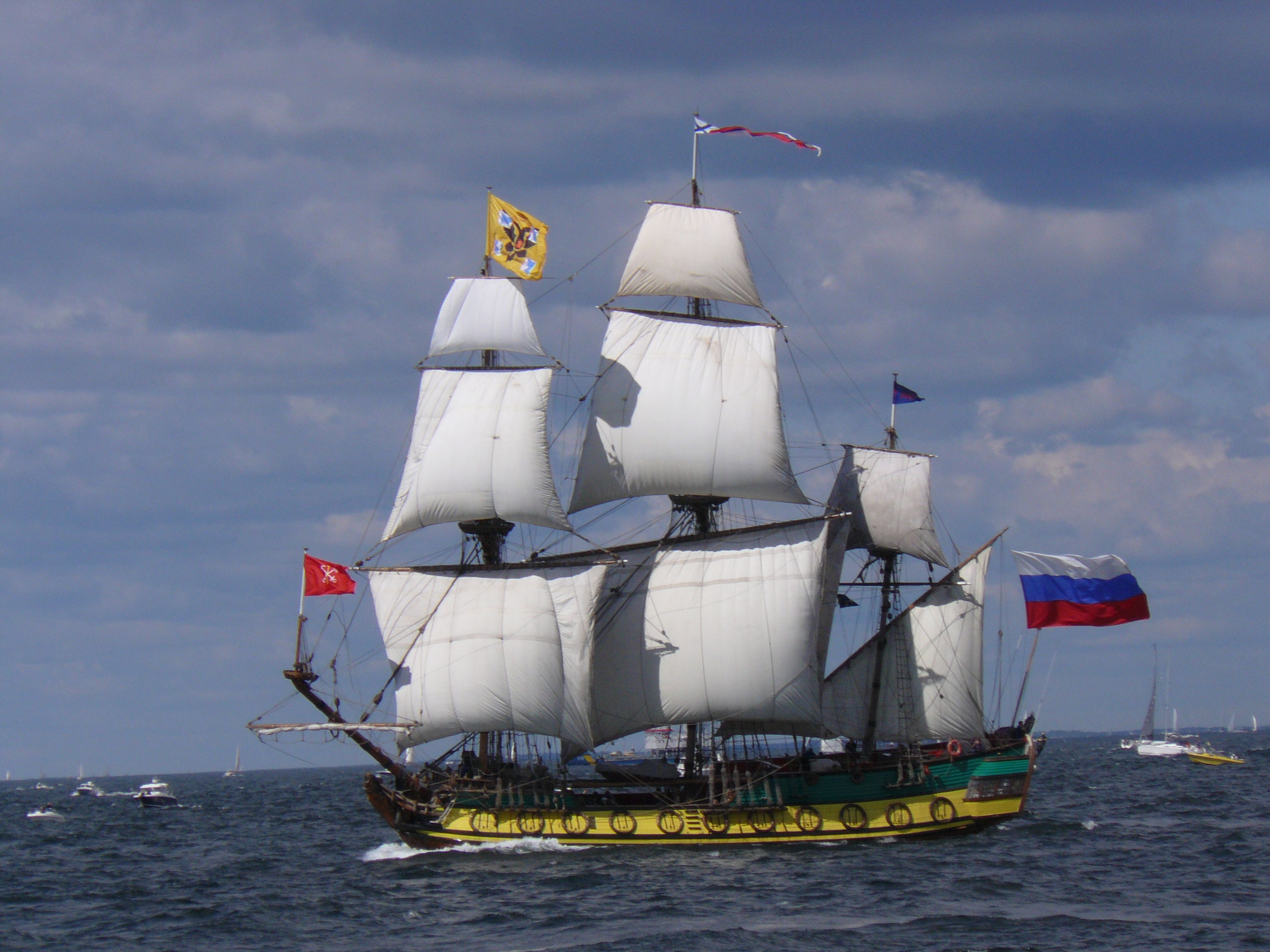 Shtandart